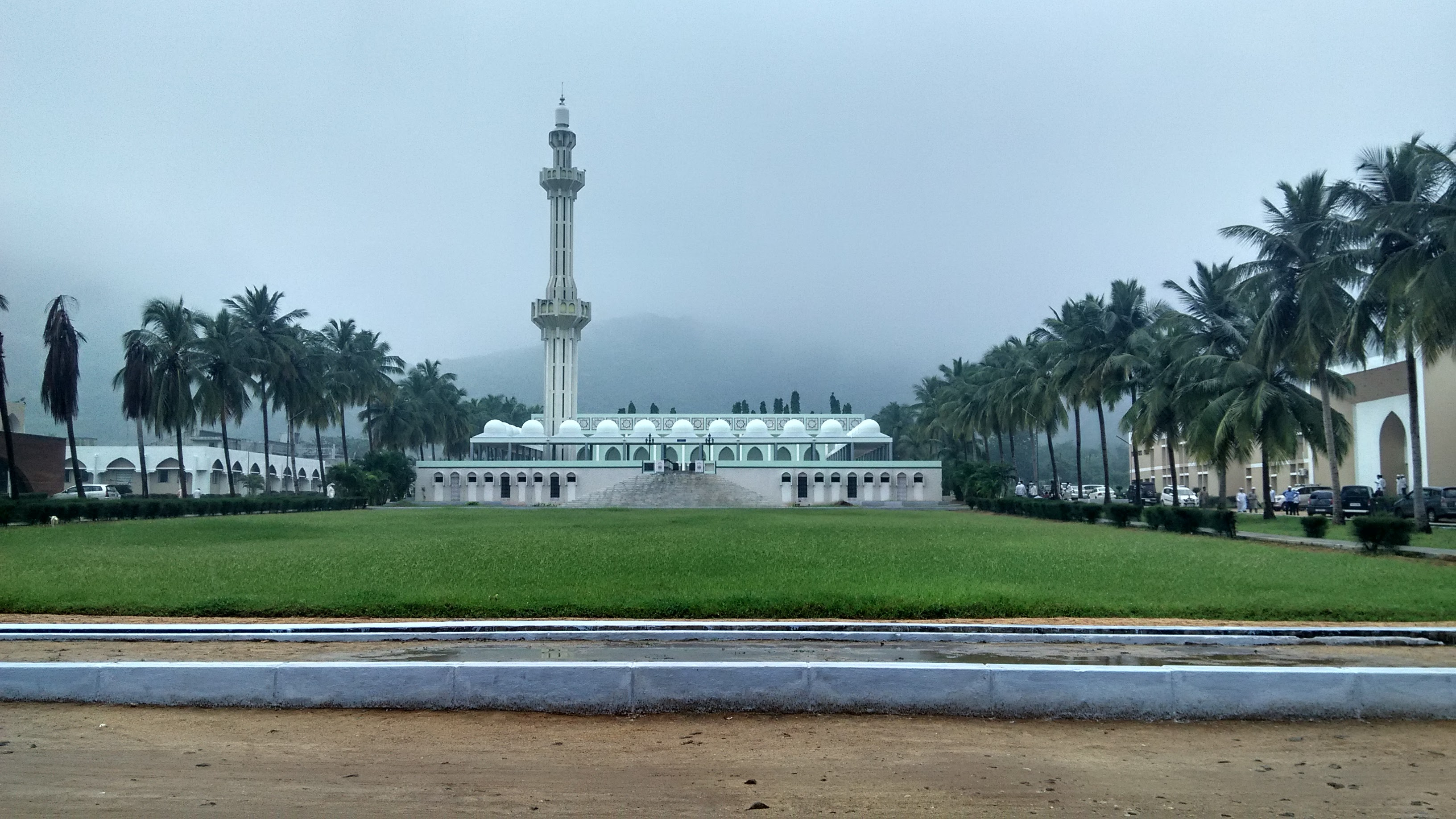 oomerabad